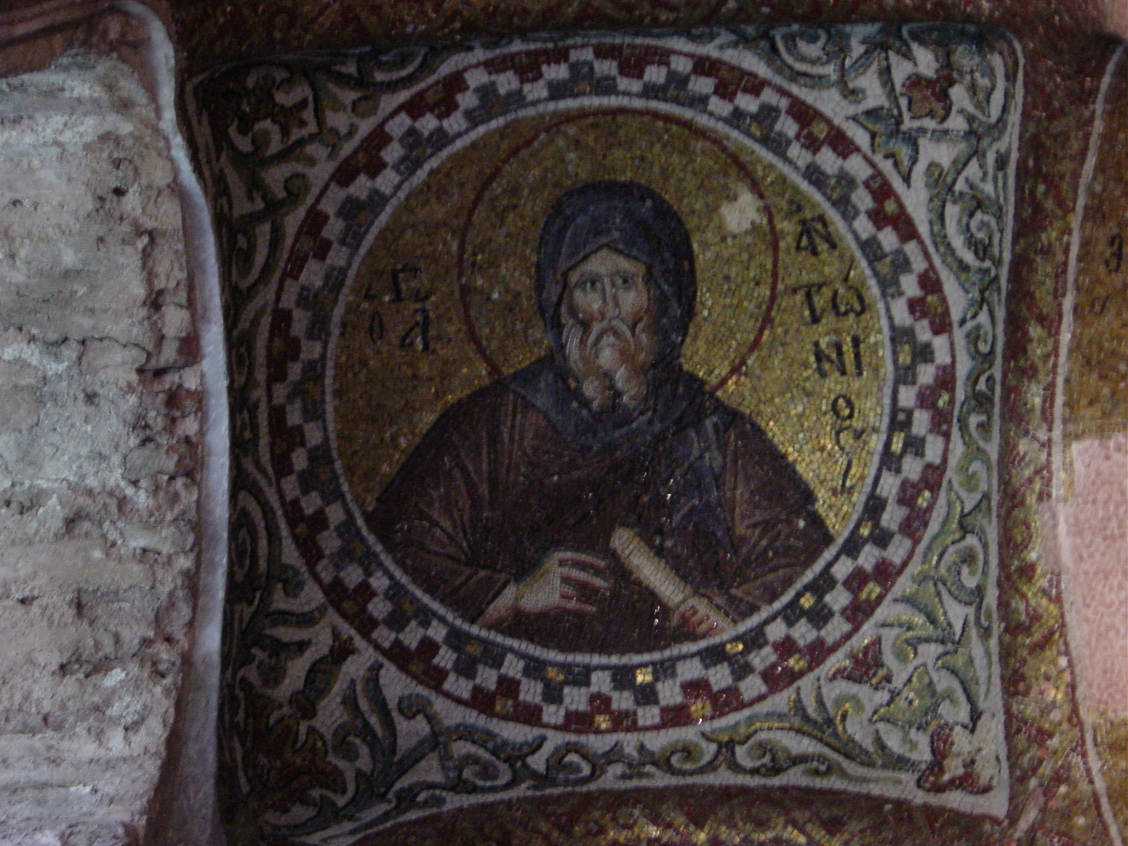 Istanbul: Museo dell'ex chiesa del Pammacaristos (Fetiye camii). Cupola con mosaico bizantino rappresentante sant'Antonio abate. Foto di: Giovanni Dall'Orto, 26-5-2006.